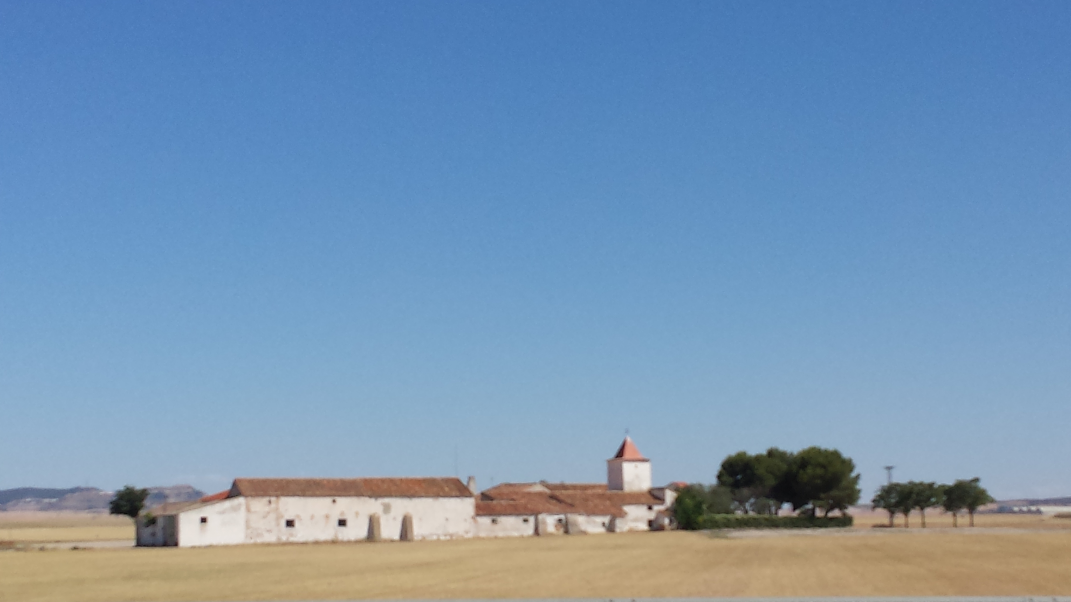 La Torrecica. Albacete. Típico caserón manchego